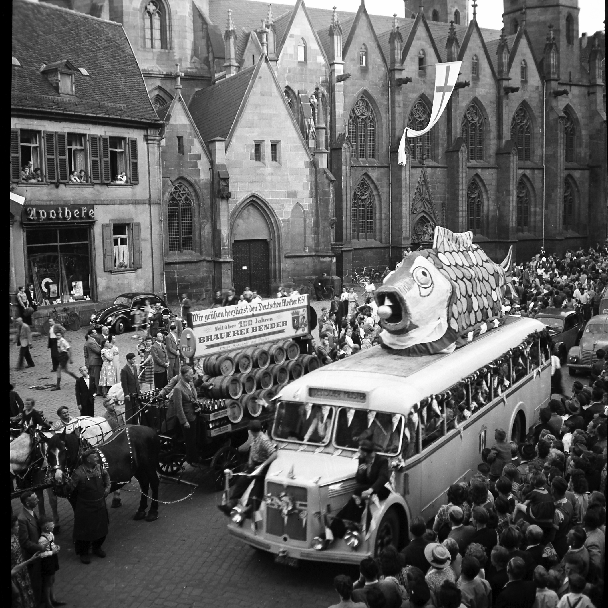 Festumzug zur Begrüßung des Deutschen Fußballmeisters 1951 in Kaiserslautern in der Marktstraße